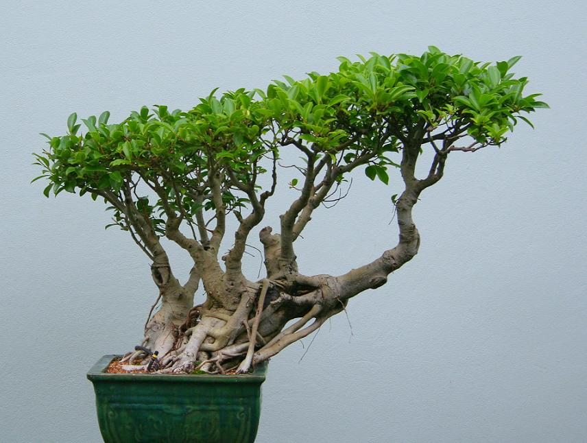 ഒരു ബോൺസായി മരം